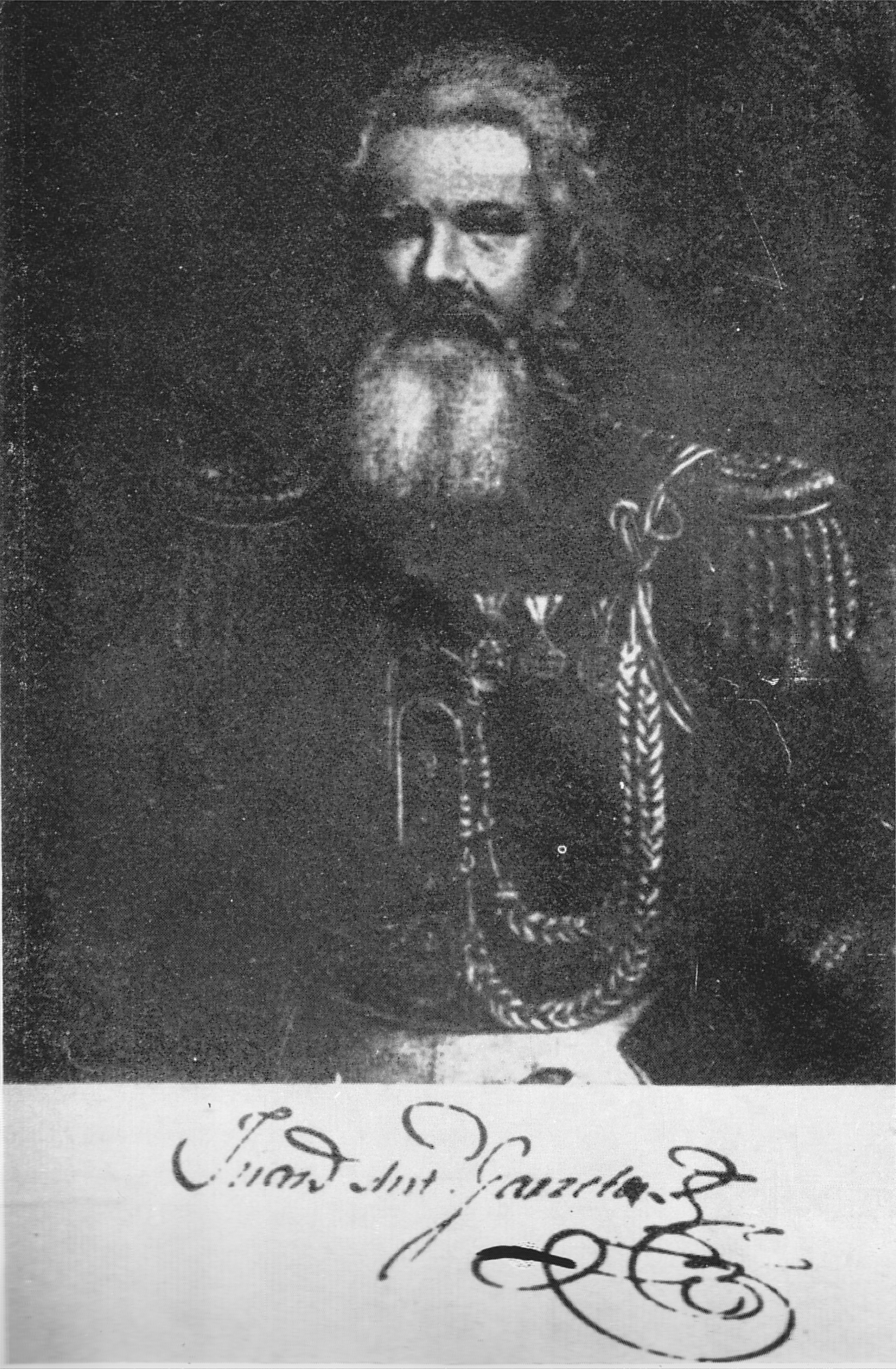 Juan Antonio Garretón, militar del Ejército Argentino